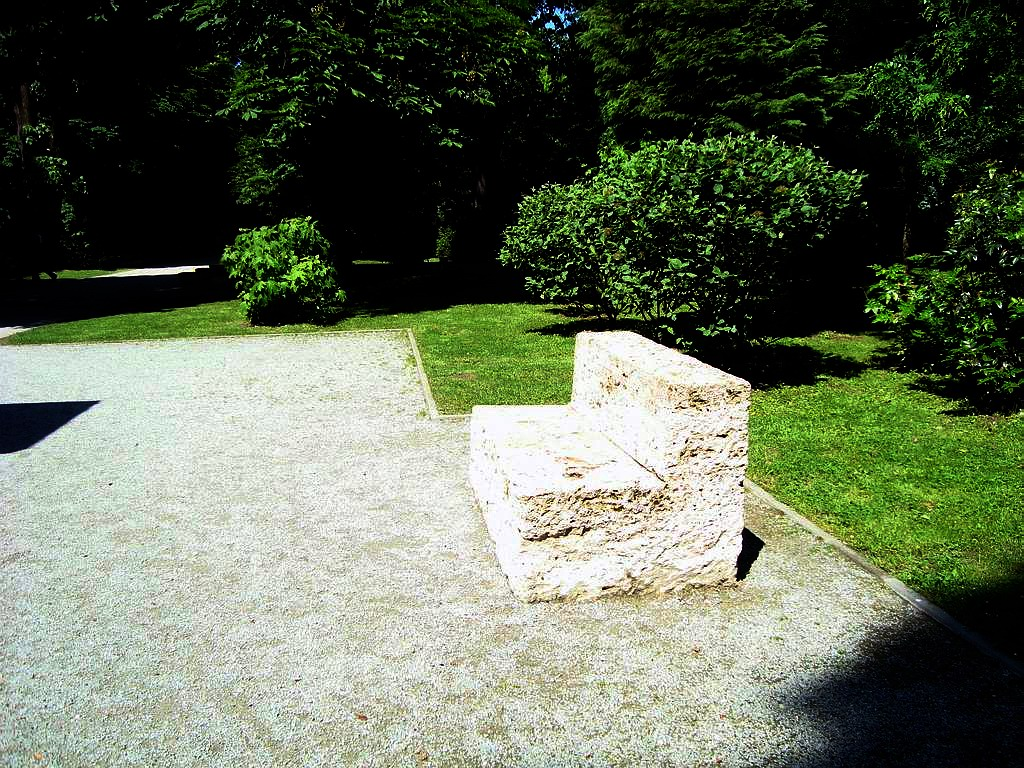 Face parte din monumentul istoric "Două bănci de piatră" din municipiul Târgu Jiu, Bd. Brâncuşi Constantin, Grădina Publică, construite de Constantin Brâncuşi în anii 1937-1938 04